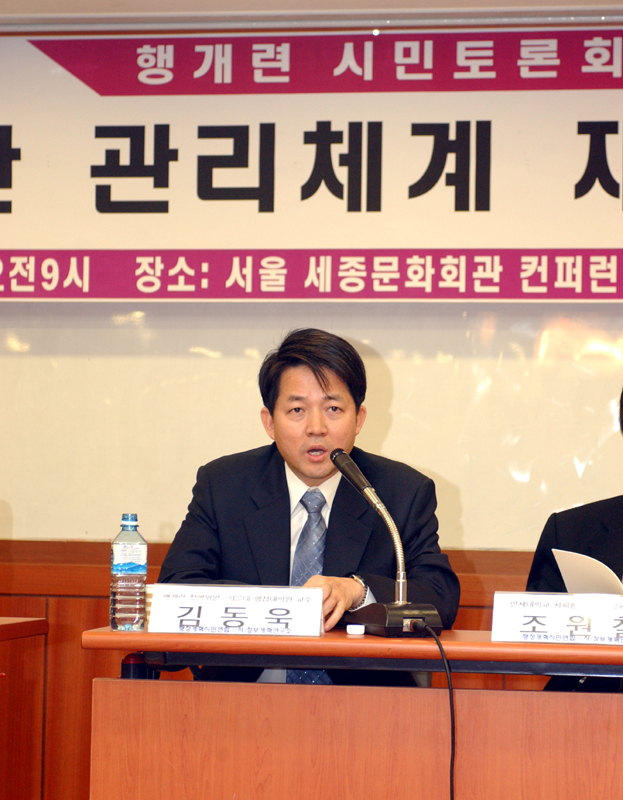 서울특별시 소방재난본부 소장 사진. photos of Seoul Metropolitan Fire & Disaster Headquarters.